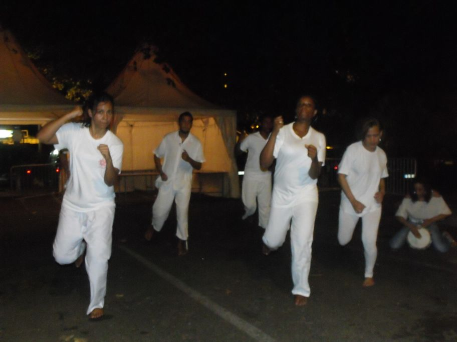 Démonstration de Moring sur la plage de Saint Pierre Réunion.